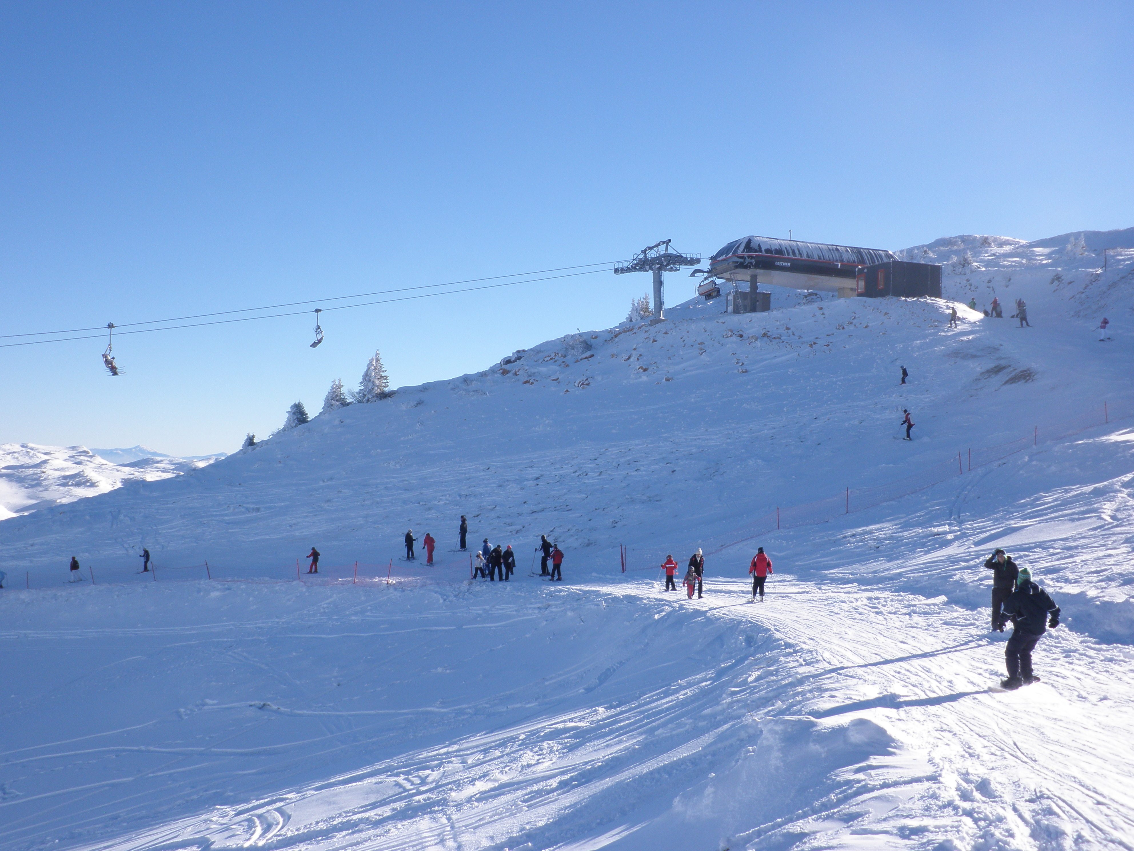 jahorina - ogorjelica - 2011